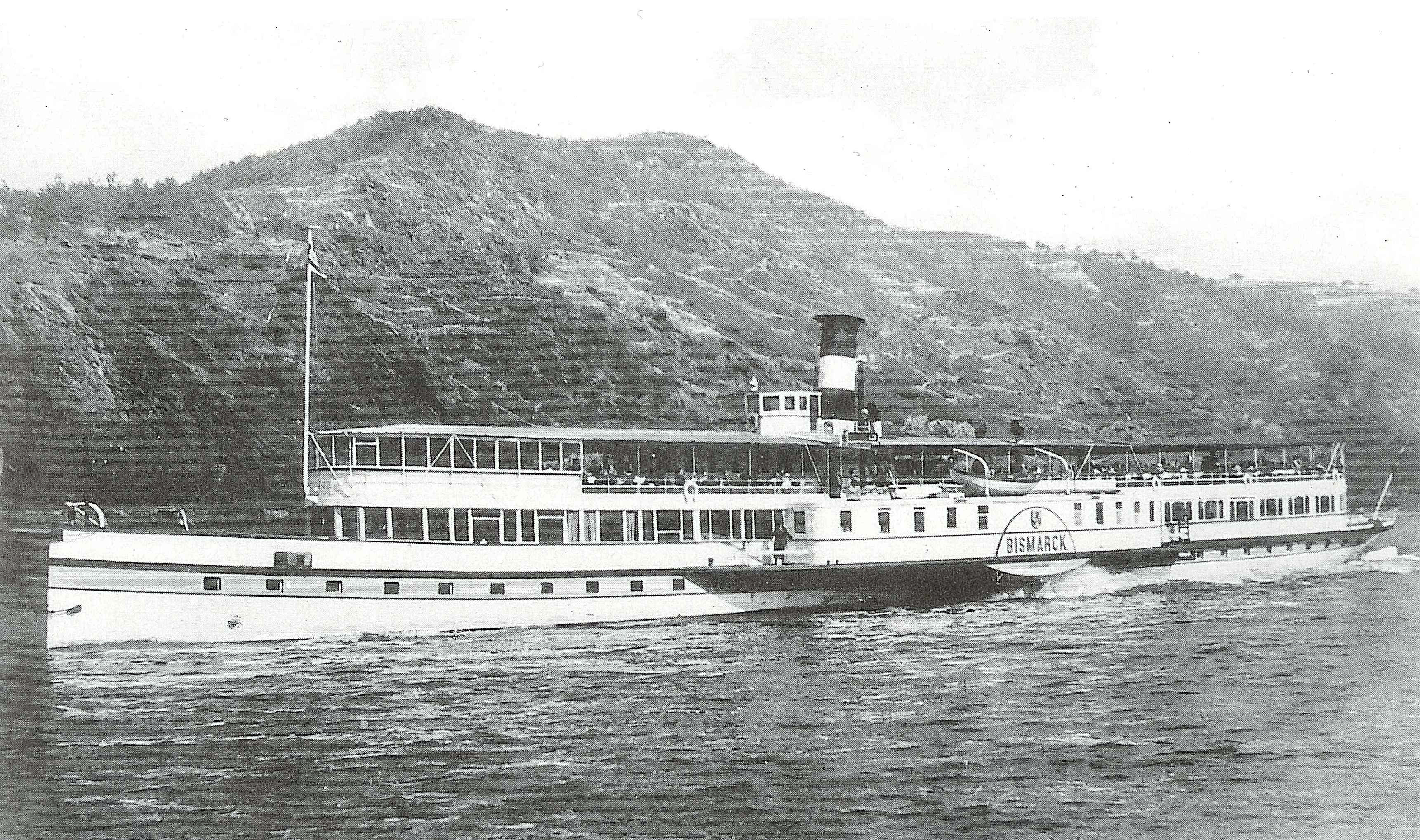 Der Raddampfer Bismarck auf dem Mittelrhein (1936)